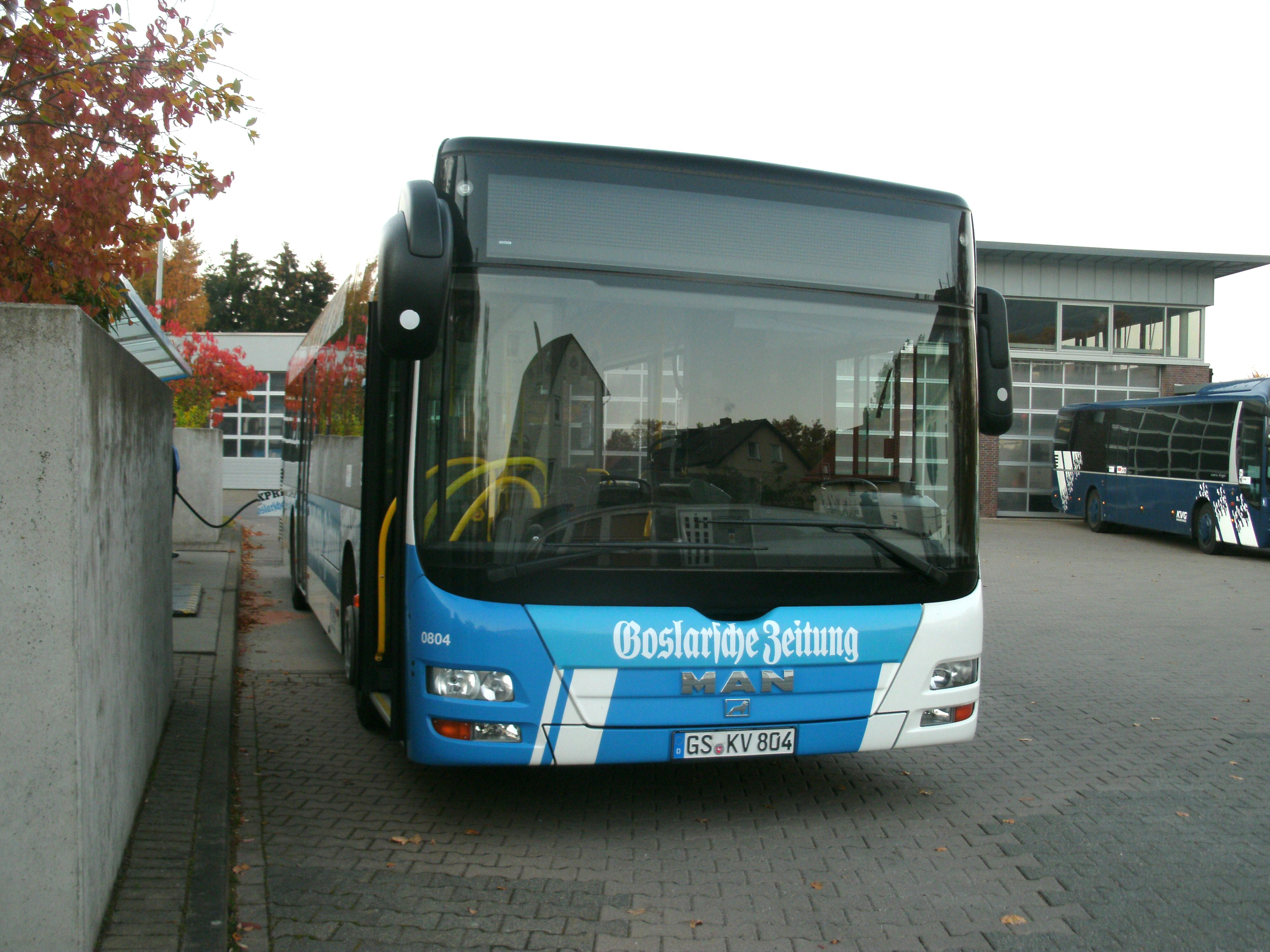 Linienbus der KVG Braunschweig auf dem Betriebshof Bad Harzburg an der Tankstelle. Das Fahrzeug wird vorwiegend im Stadtverkehr Bad Harzburg auf der Ringlinie 873 eingesetzt.